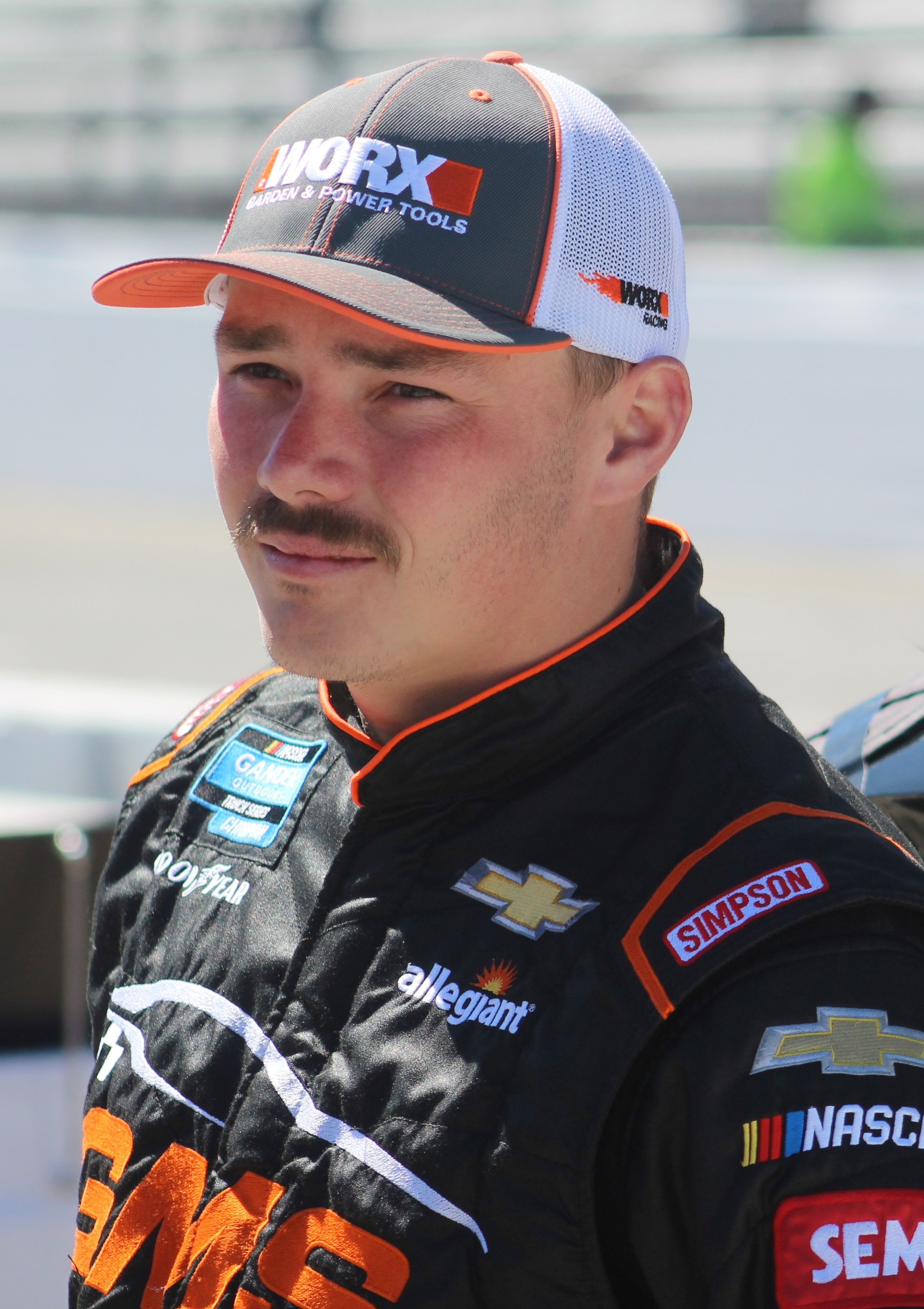 2019 STP 500